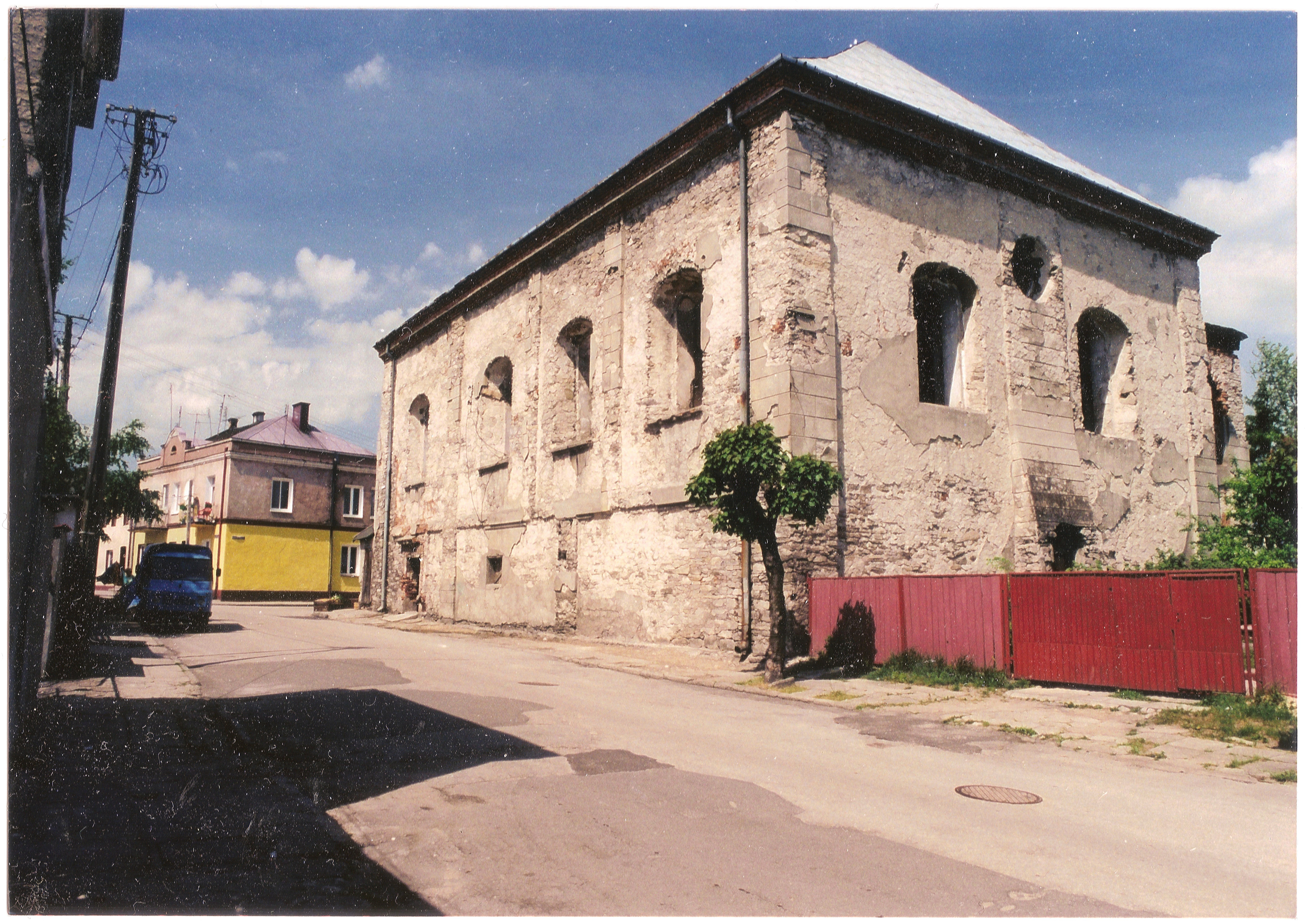 Chmielnik, synagoga, obecnie nieużytkowana, 1630, 1942 r.